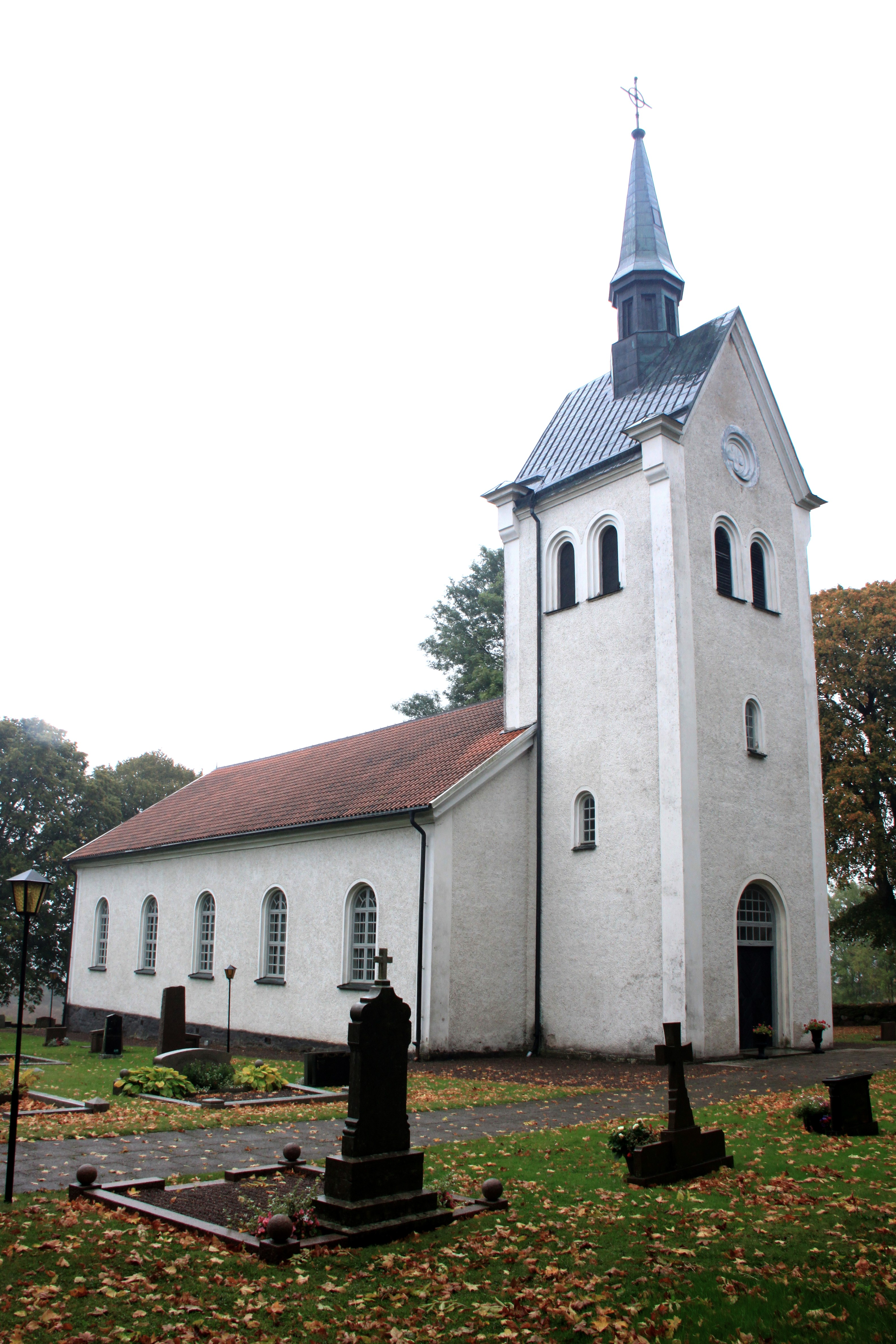 Häggums kyrka (Häggum 39:1)